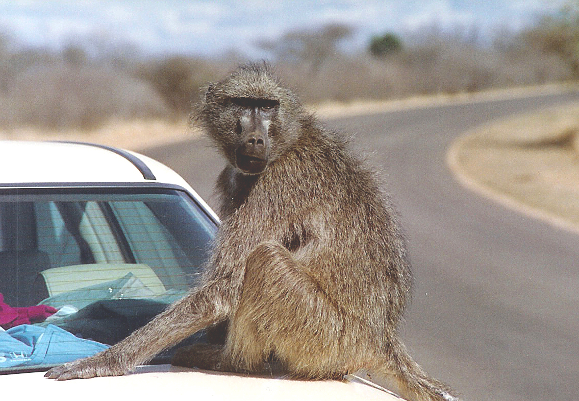 Af op engem Auto am Krügerpark.